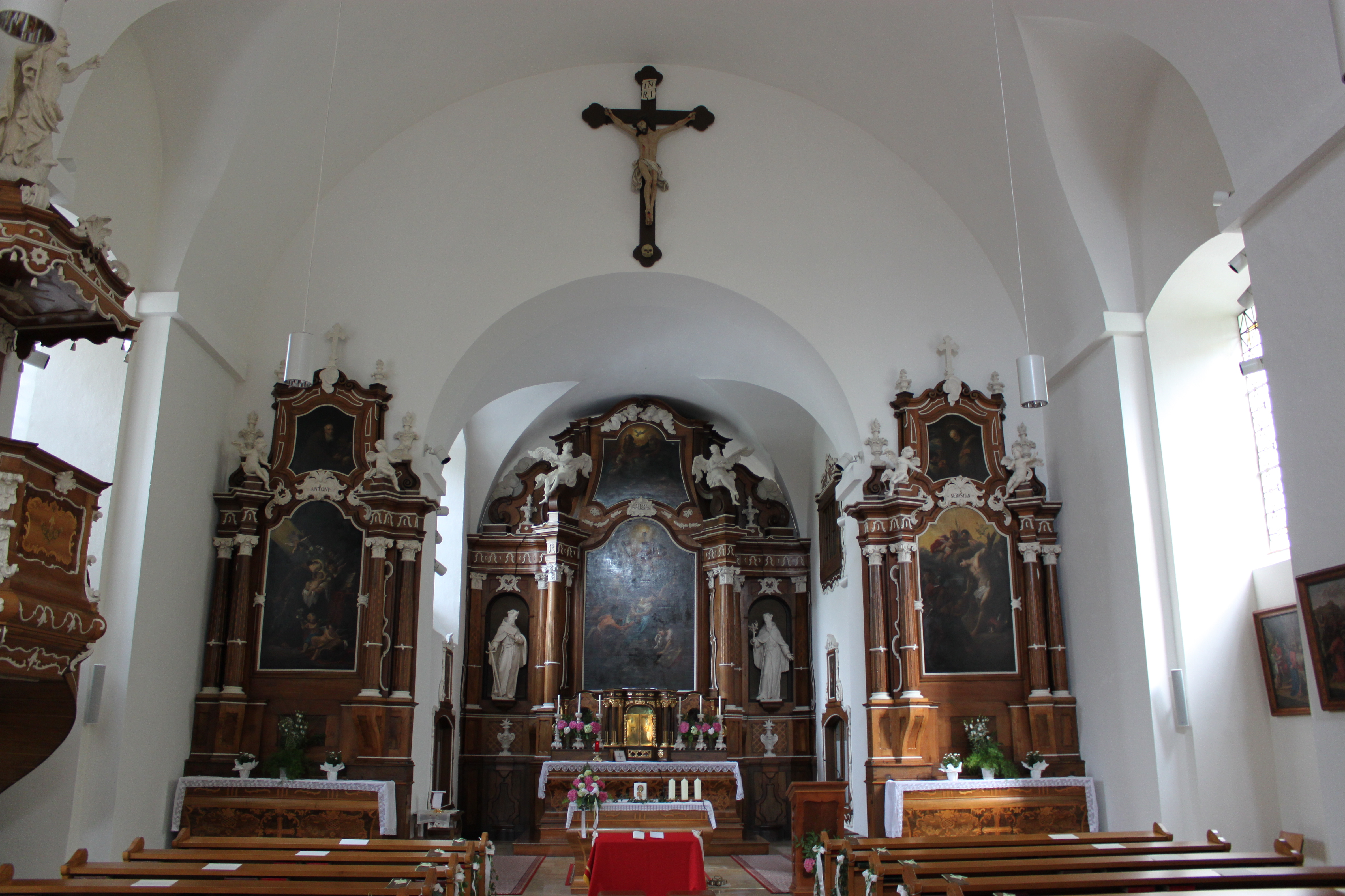 Innenraum der Klosterkirche St. Barbara, Scheibbs, Niederösterreich